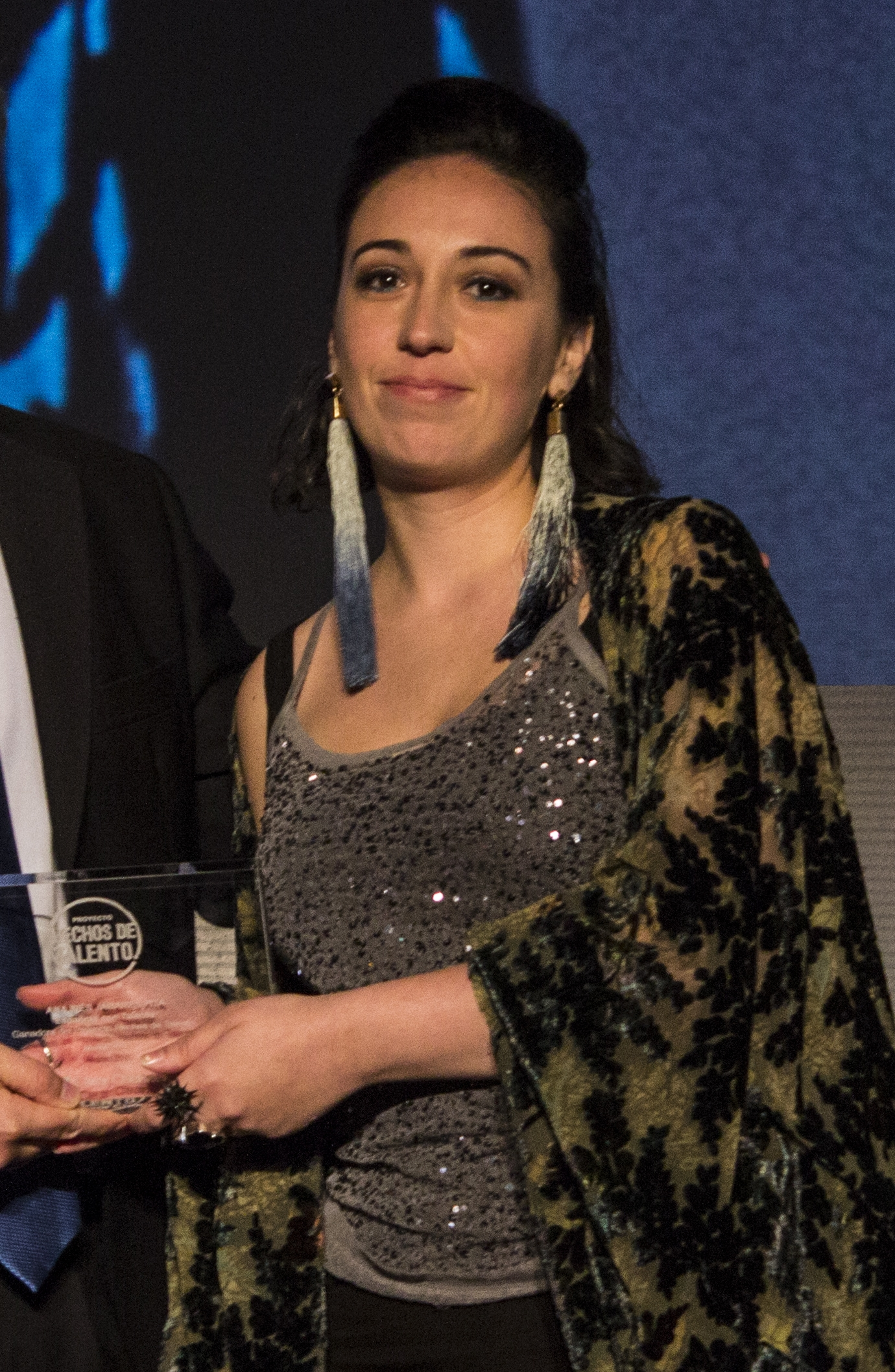 La escenógrafa Ana Inés Jabares-Pita en los premios Hechos de talento